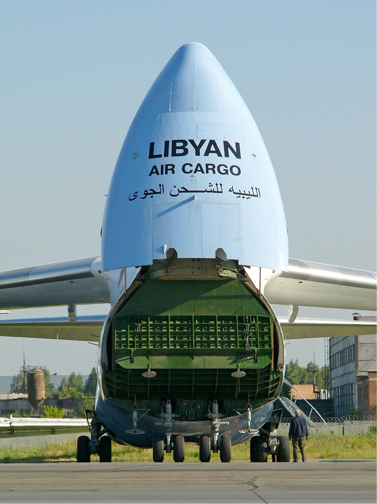 Libyan Air Cargo Antonov An-124